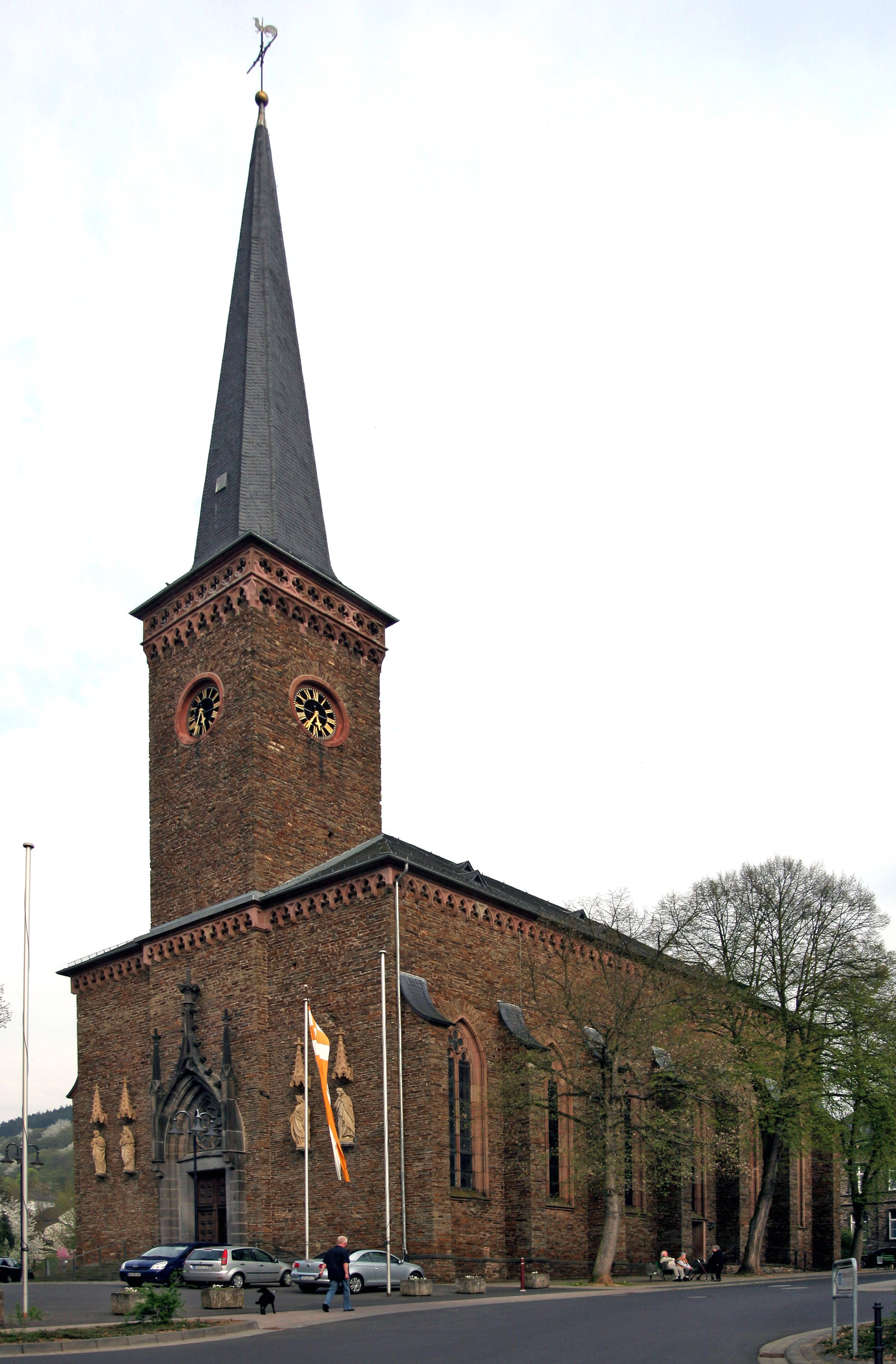 Die Pfarrkirche St. Johannes der Täufer in Treis-Karden, Ortsteil Treis, an der Mosel (Rheinland-Pfalz) Architect: Johann Claudius von Lassaulx